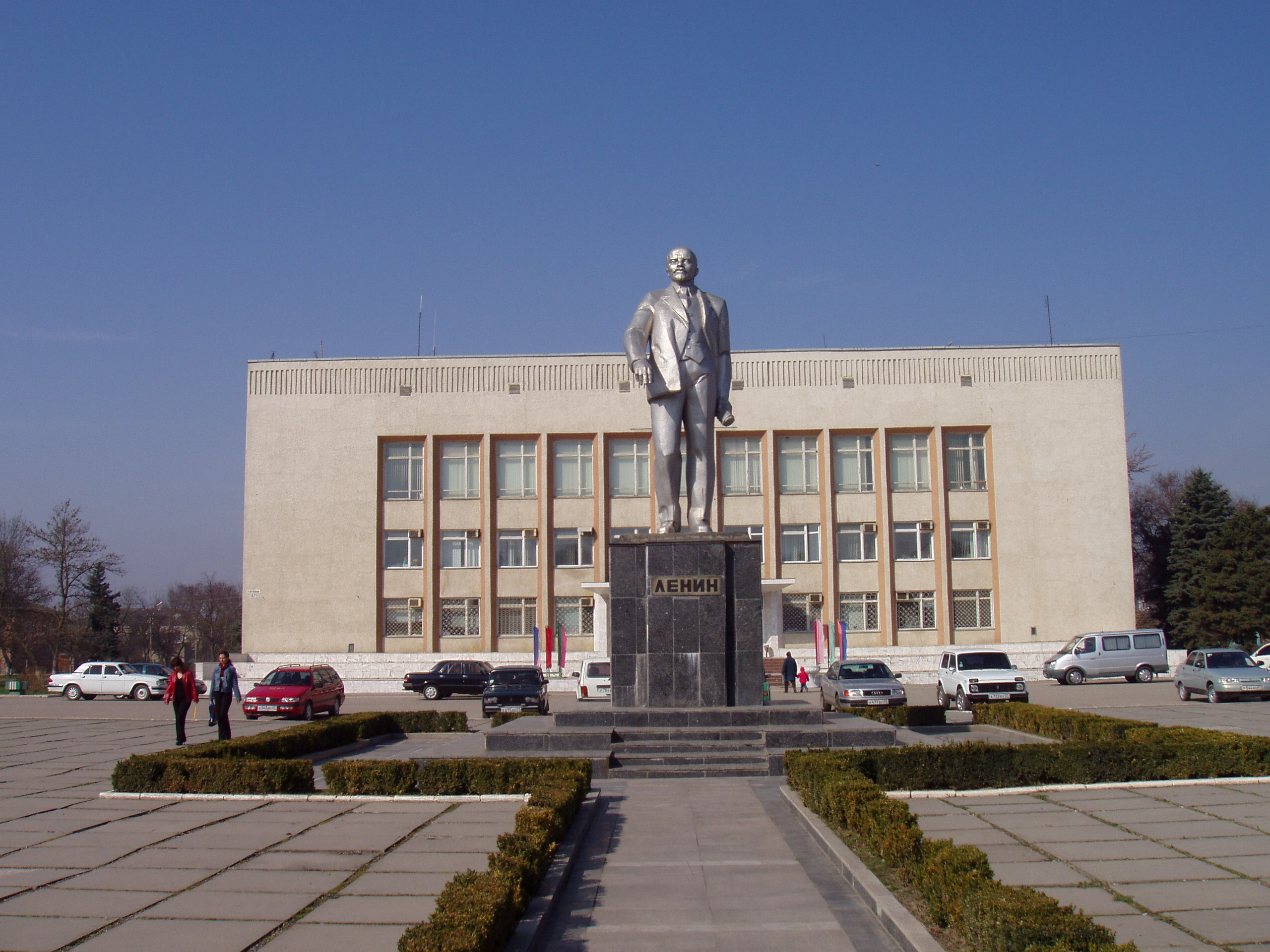 Памятник Ленину перед зданием городской администрации в Прохладном (КБР)